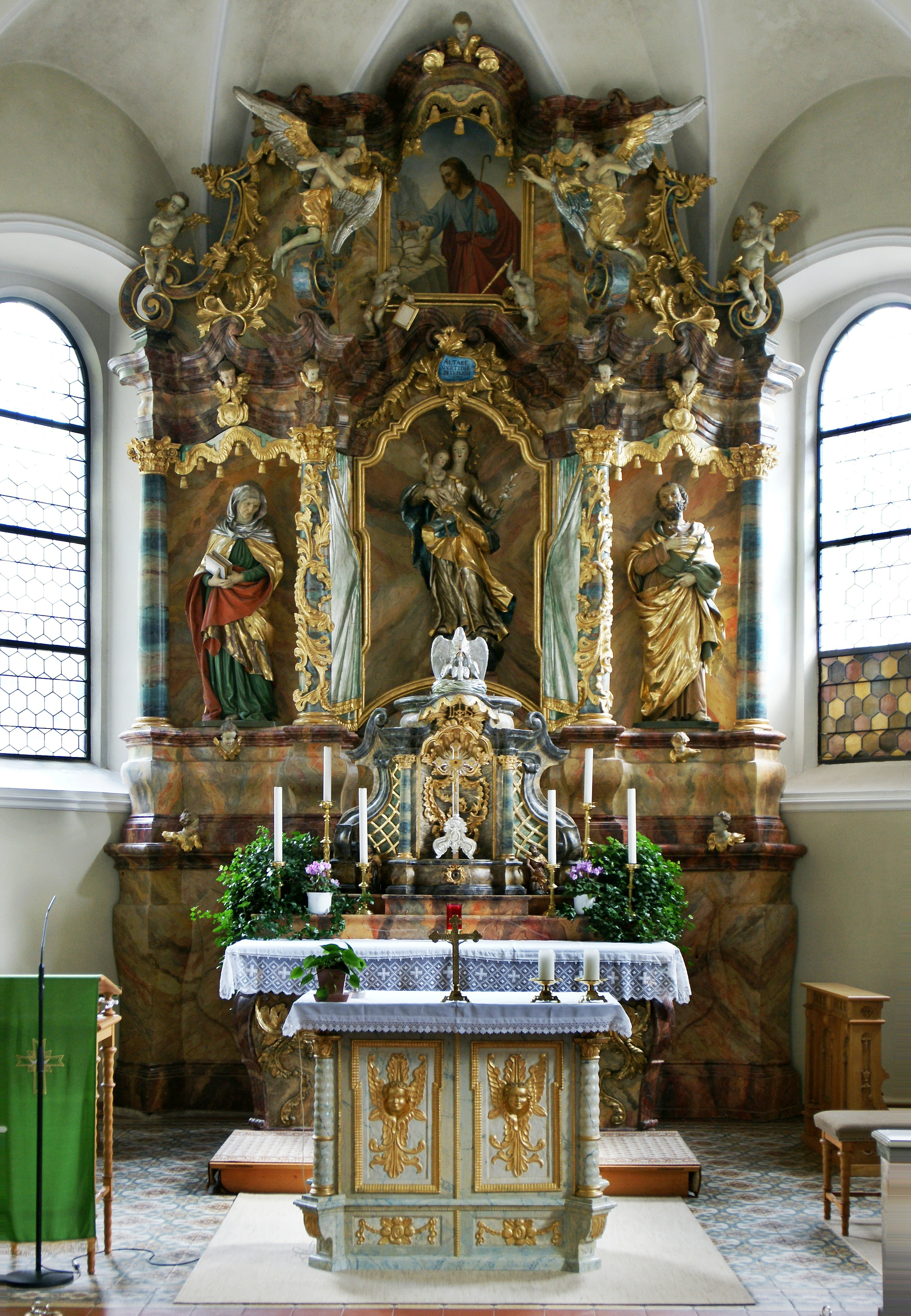 aus dem DEHIO Vorarlberg 1983: Buchbodner Pfarrkirche unserer lieben Frauen Mariä Gebut: Hochaltar, bez. 1761 (aus Bürs, 1903 aufgestellt); Viersäulen-Baldachinaufbau mit Voluntenaufsatz auf geschwungenem Grundriß mit reichem Rocailledekor; anstelle des Gemäldes Figur Immaculata (aus Hörbranz), Oberbild Guter Hirte, von Anton Jehly; 1903, Figuren unter Baldachin li. hl.Anna, re. hl. Josef von Gebhard Moosbrugger, 1903-1905; Gebälkengel und Putten, Johann Ladner zugeschrieben, 1761. - Tabernakel mir Rocailledekor, 1761.